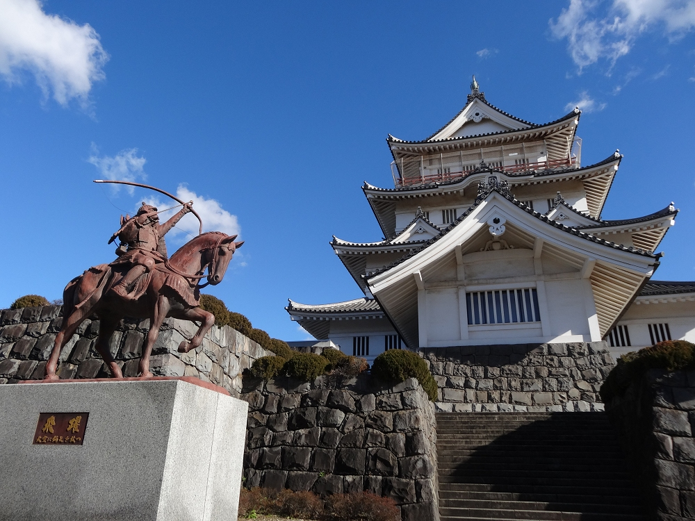 千葉市郷土博物館